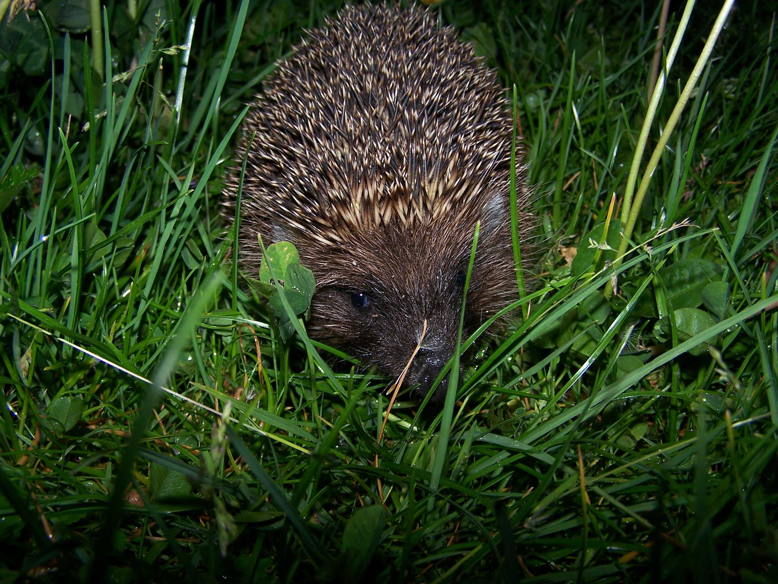 Jeż